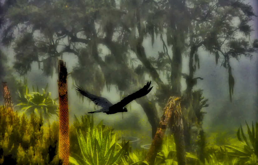 corvus crassirostris